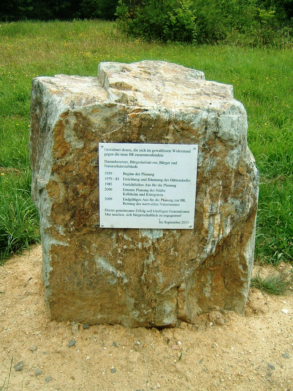 Gedenktafel in Kelkheim an der Stelle an der der Widerstand gegen das Projekt B 8 als jahrelanges Zeltlager stattfand.